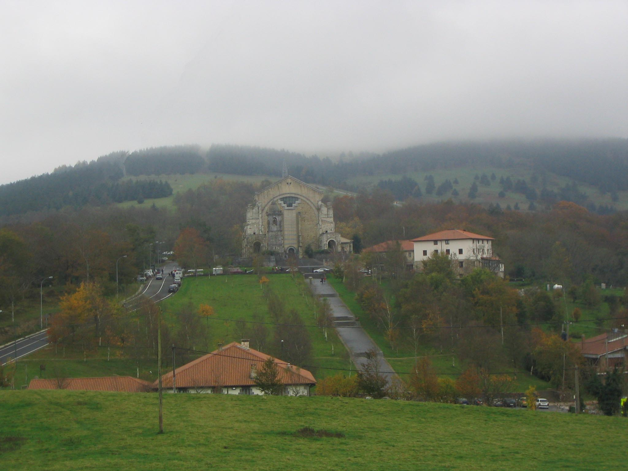 Santuario de los santos Antonios de Urkiola, corazón del Parque Natural de Urkiola Abadiano , Vizcaya, País Vaco, España.